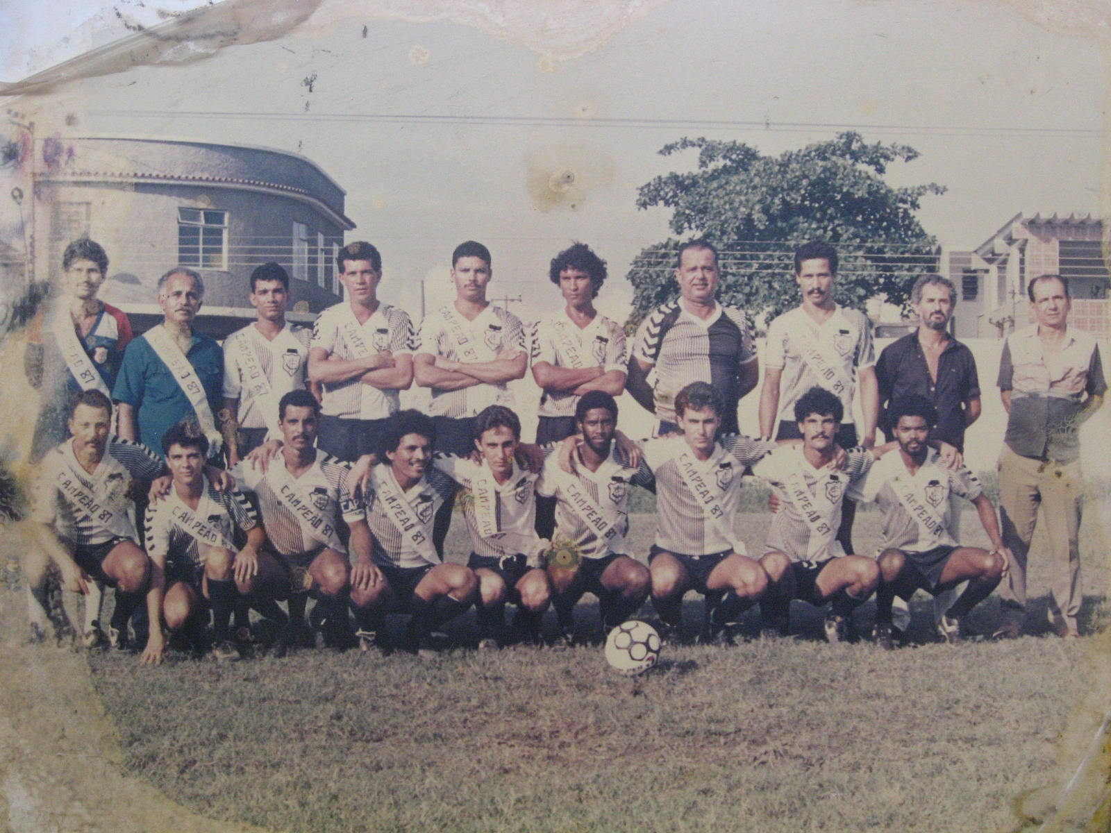 Equipe principal do Fazenda, campeã da Liga Desportiva de São João de Meriti em 1987 e que tinha Berico, o atual presidente, como jogador.